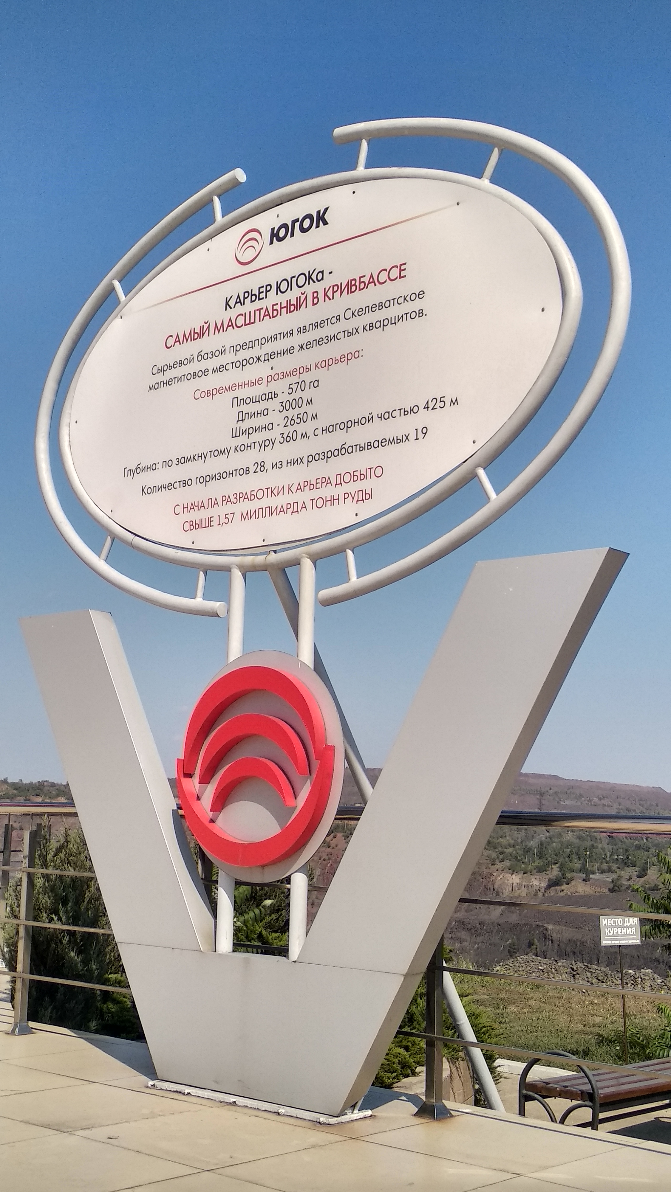 Описание ЮГОКа